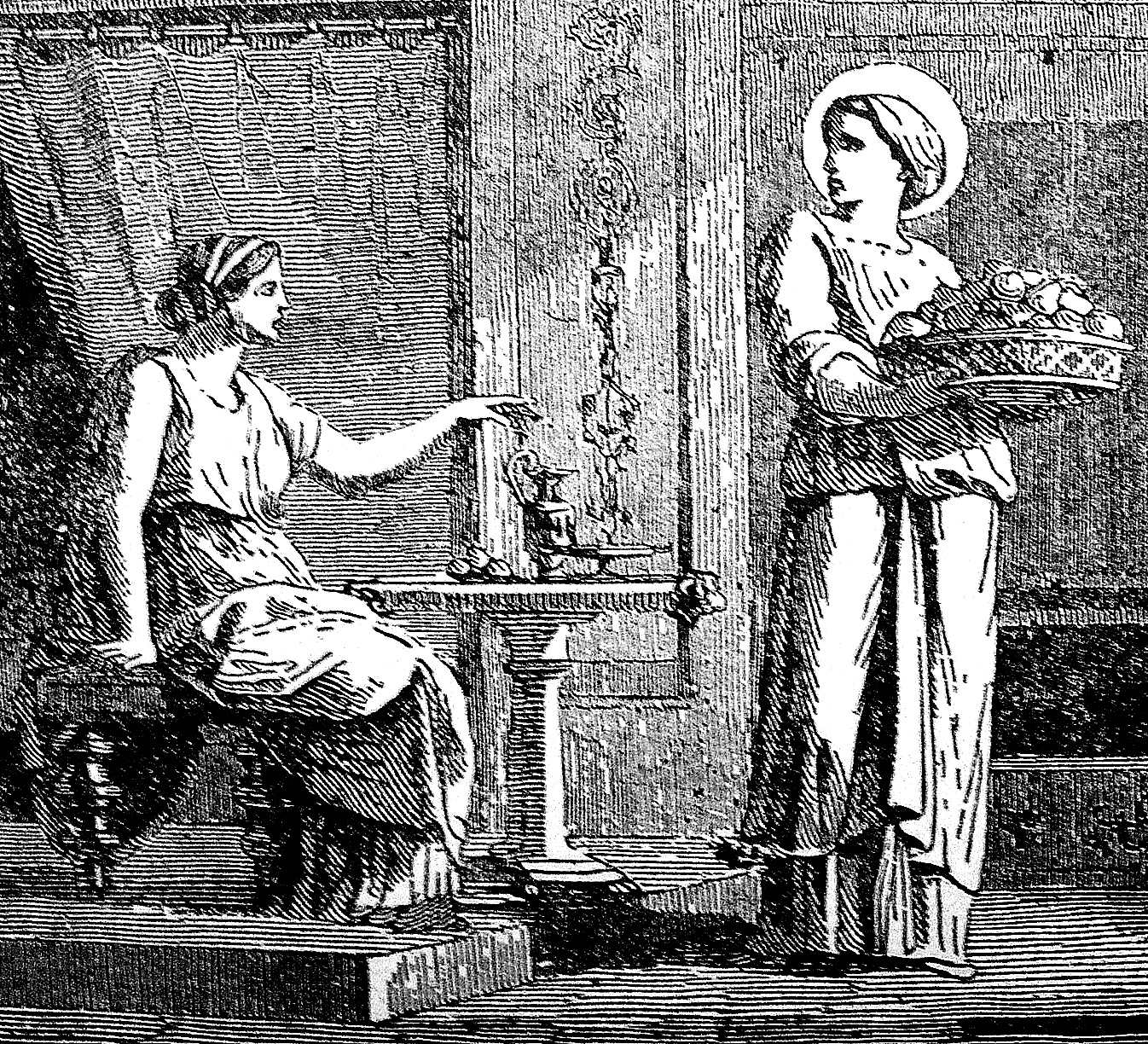 Saint Seraphia (or Serapia)